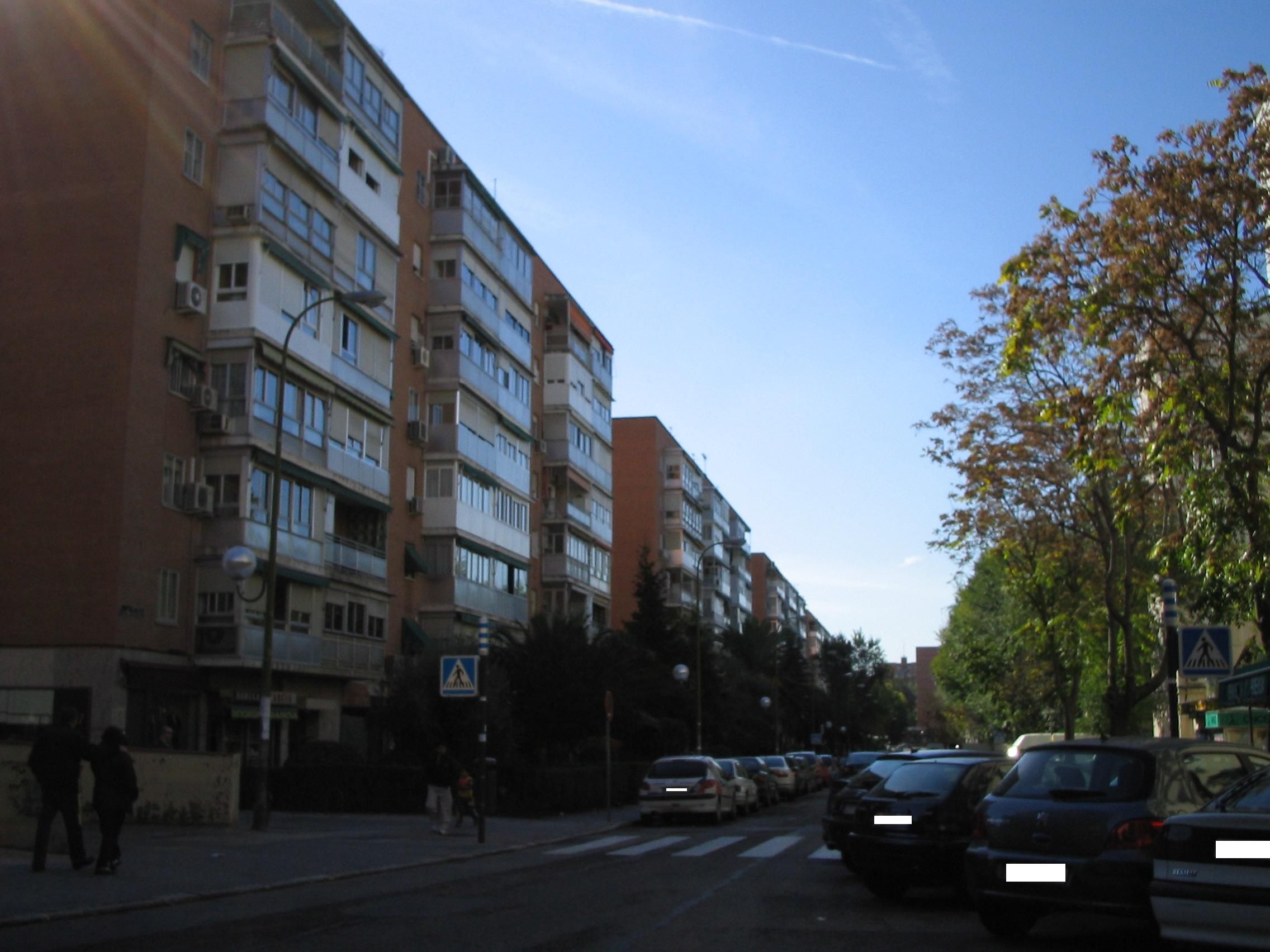 Calle La del Manojo de Rosas en la Ciudad de los Ángeles, barrio de Madrid en el distrito de Villaverde.